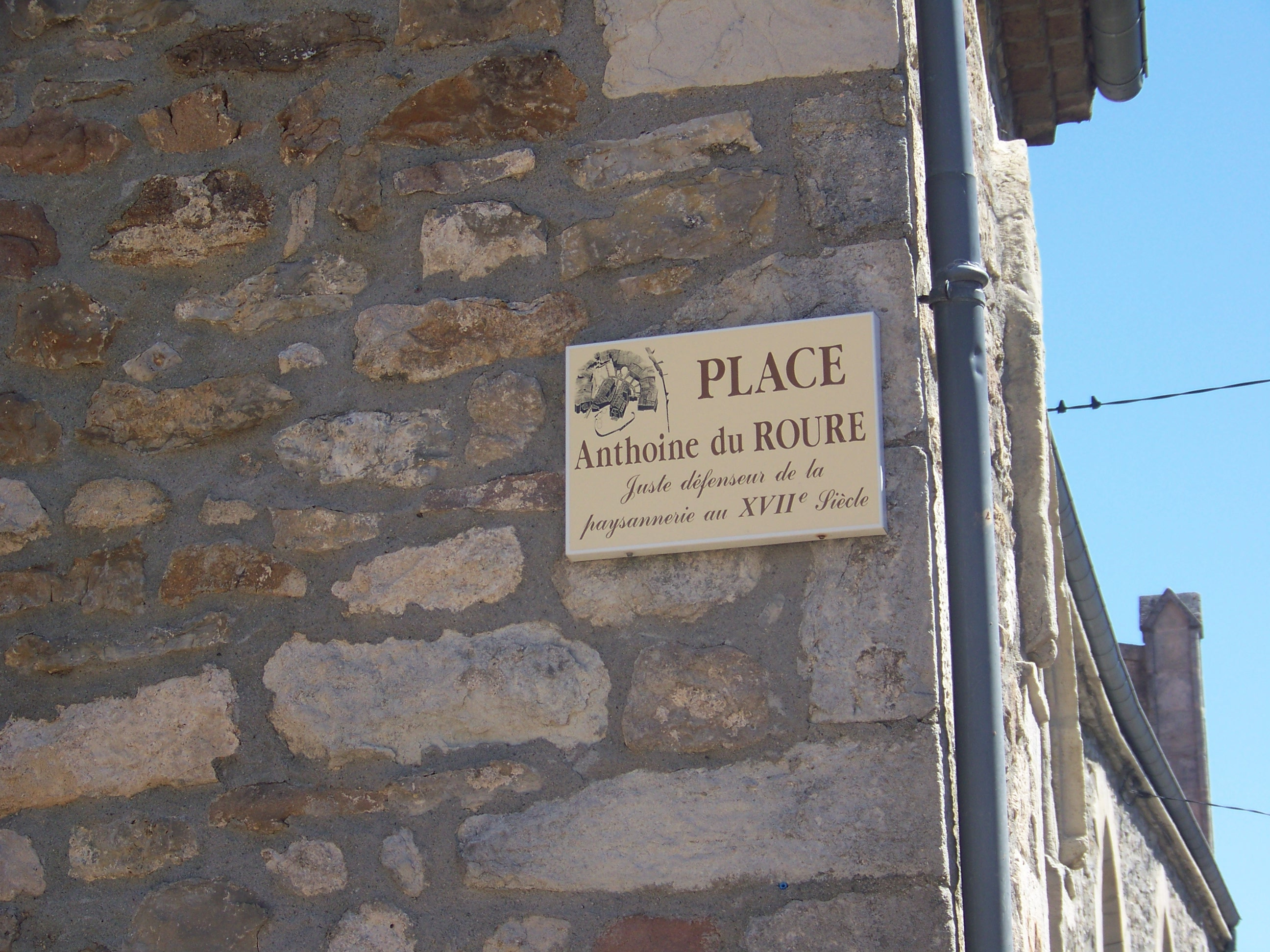 Souvenir d'Anthoine du Roure